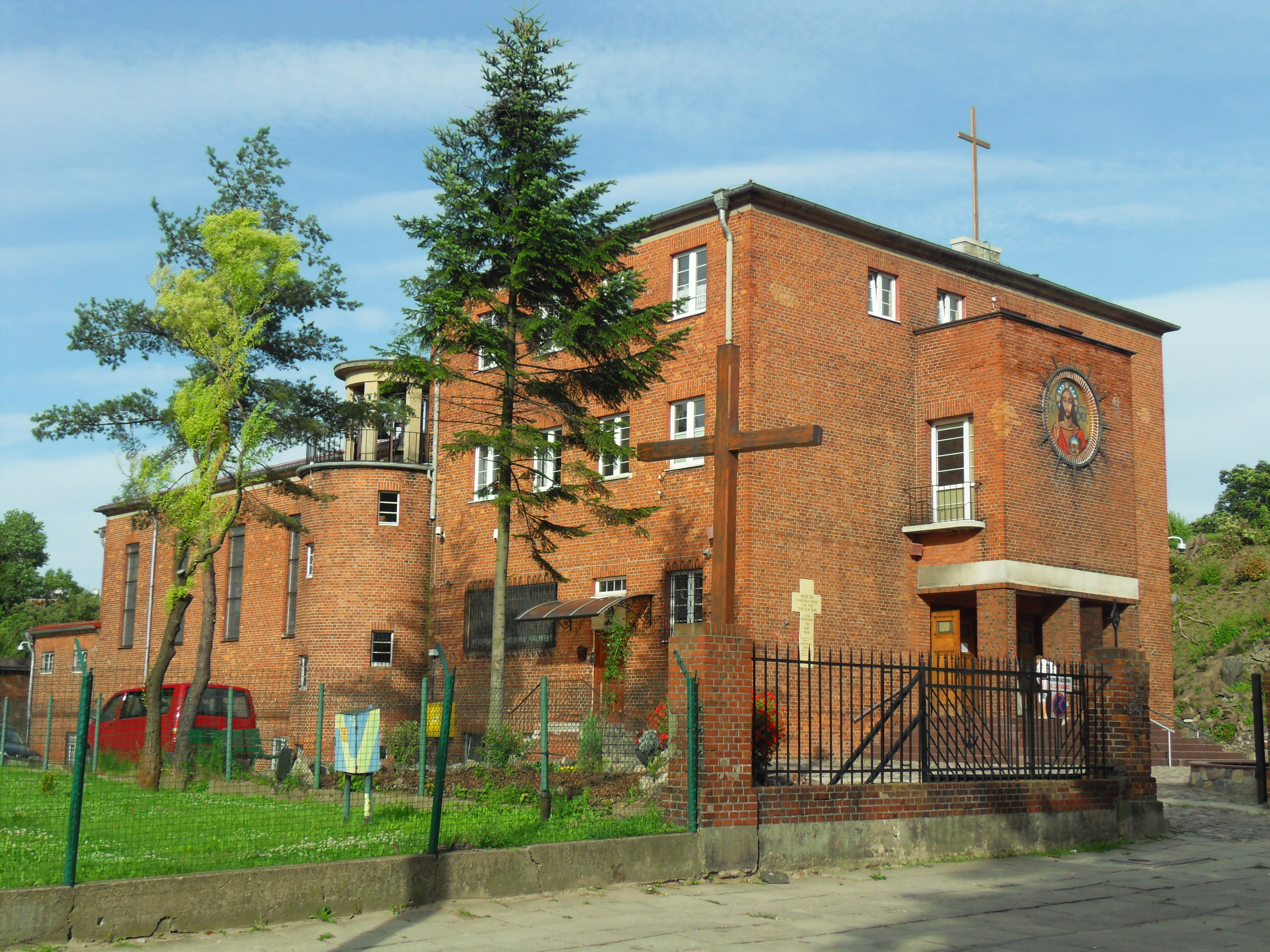 Kościół Chrystusa Króla w Gdańsku.